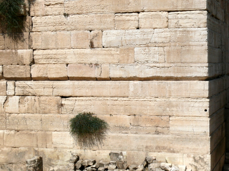 Jerusalem:Süd-West Mauer unterhalb des Tempelberges